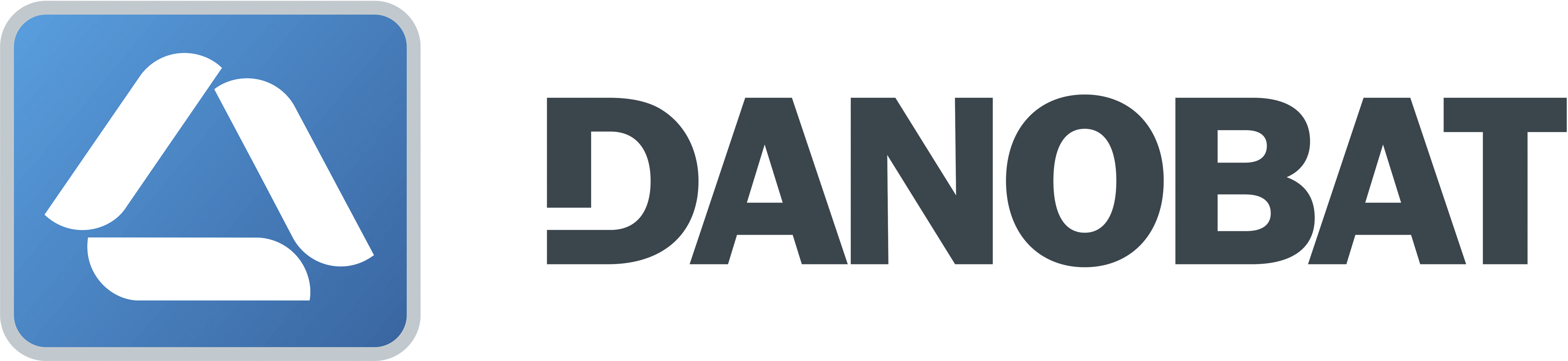 Logo de la empresa Danobat